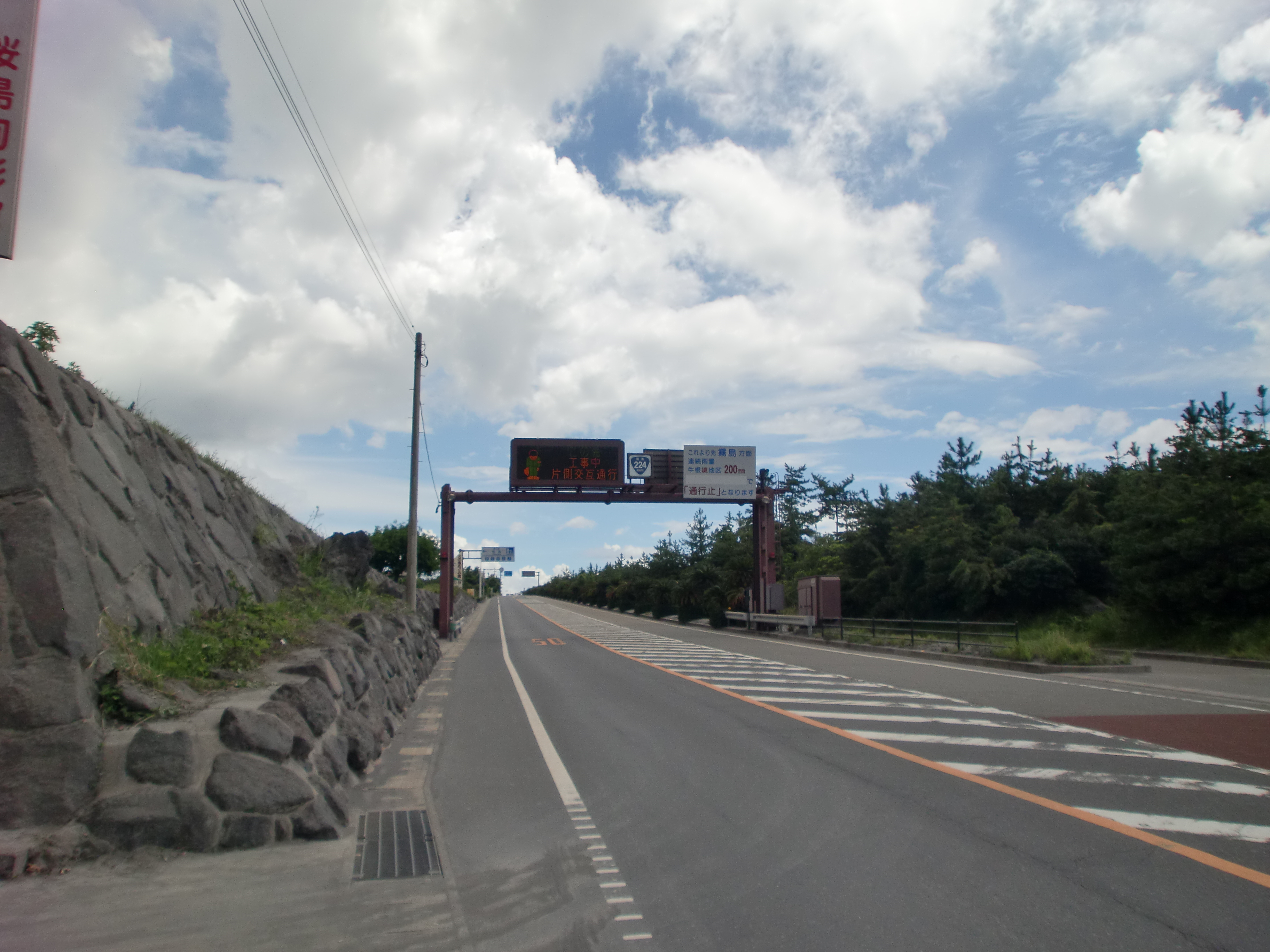 国道224号を桜島横山町から垂水市方面に望む。